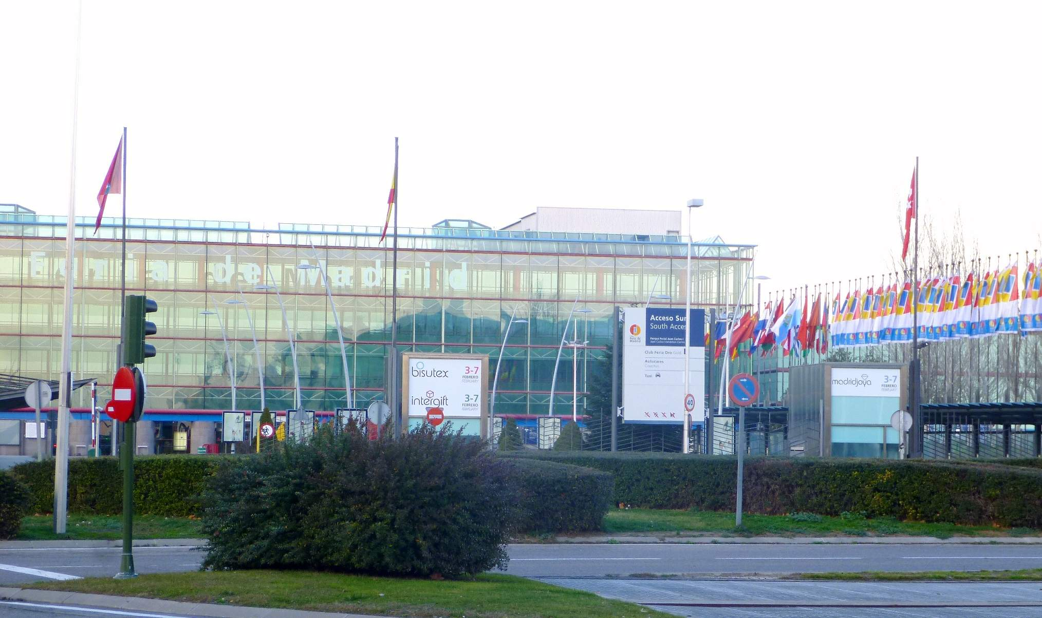 Feria de Madrid (IFEMA)